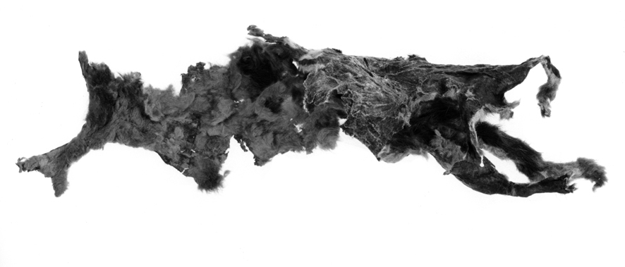 Nerzfell aus dem prähistorischen Salzbergbau am Dürrnberg II Das Nerzfell ist publiziert u.a. in T. Stöllner, Der prähistorische Salzbergbau am Dürrnberg II. Dürrnberg-Forschung 3 (Rahden 2002) Taf. 395,2506 und Th. Stöllner, "Verborgene Güter". Rohstoffe und Spezereien als Fernhandelsgut in der Späthallstatt- und Frühlatènezeit. In: M. Guggisberg (Hrsg.), Die Hydria von Grächwil. Schriften Hist. Mus. Bern 5 (Bern 2004) 137-158 bes. Abb. 6 Das Stück wurde von W. Groenman van Waateringe (Univ. Amsterdam) als Nerz bestimmt; die Abbildung kann mit den obigen Hinweisen verwendet werden: Dürrnberg, Nerzfell aus dem prähistorischen Salzbergbau am Dürrnberg II